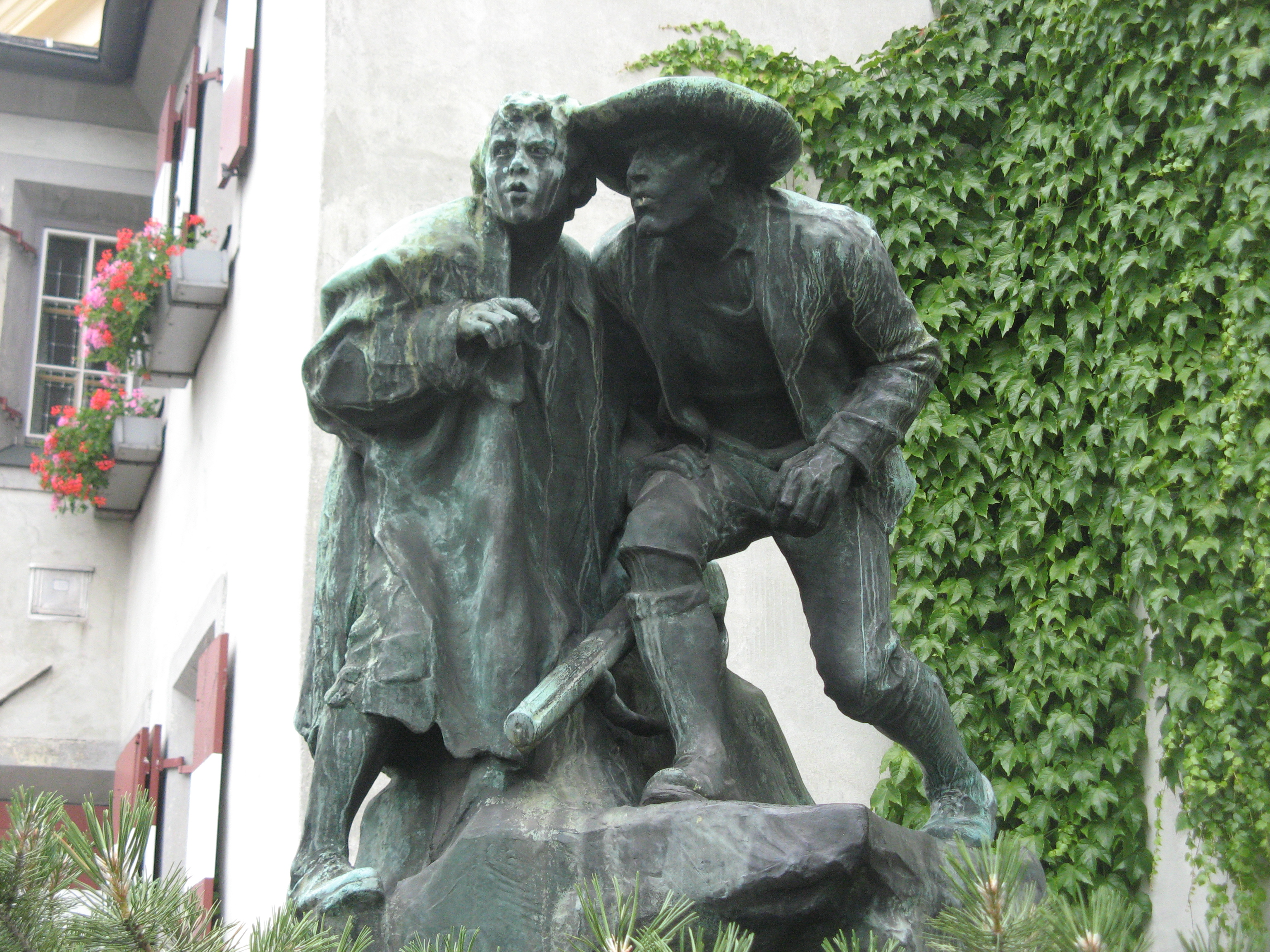 Christian Plattner: Anno Neun, Bronzegruppe (1904), Innsbruck, vor der Ottoburg